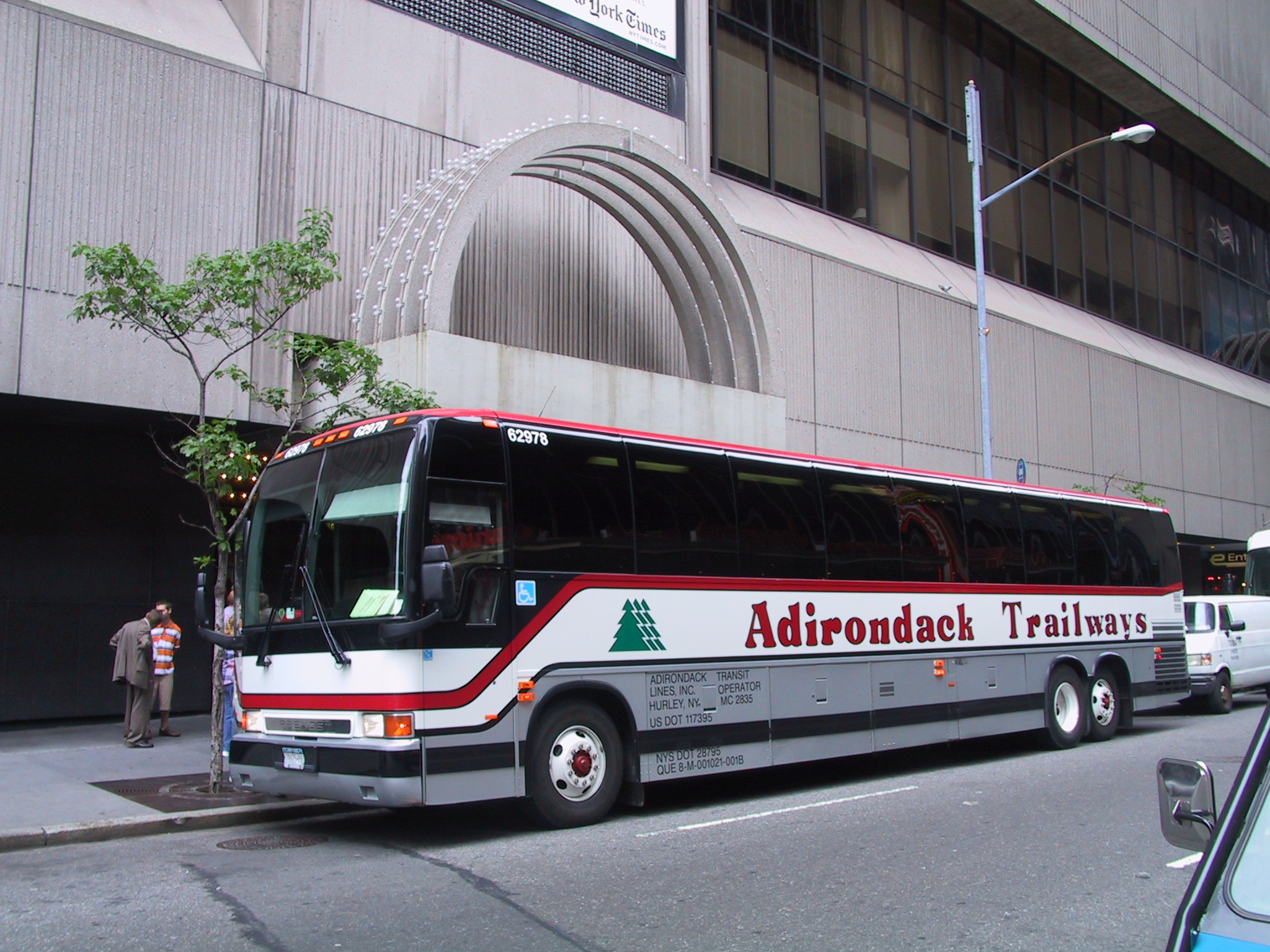 Prevost XLII motor coach